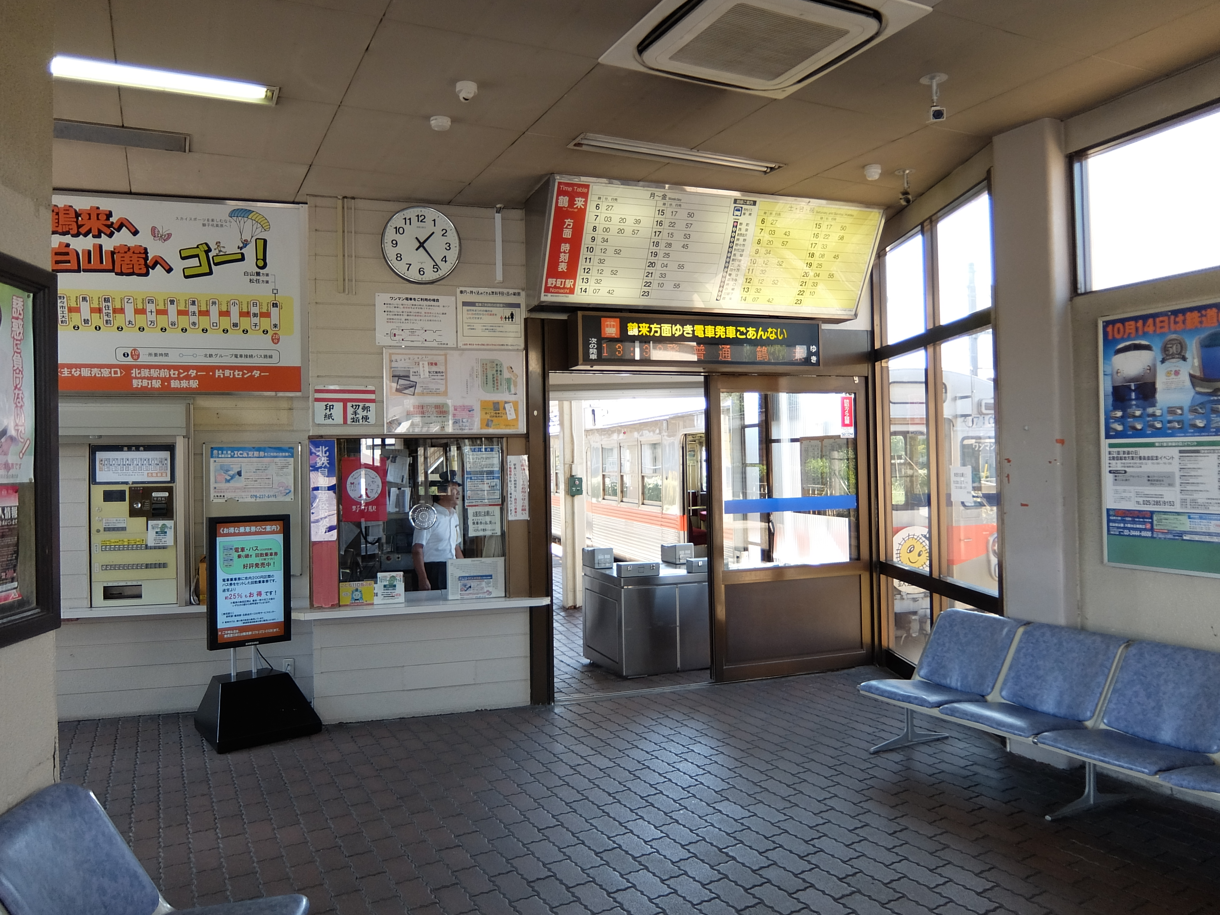 北陸鉄道 野町駅 駅舎内の様子